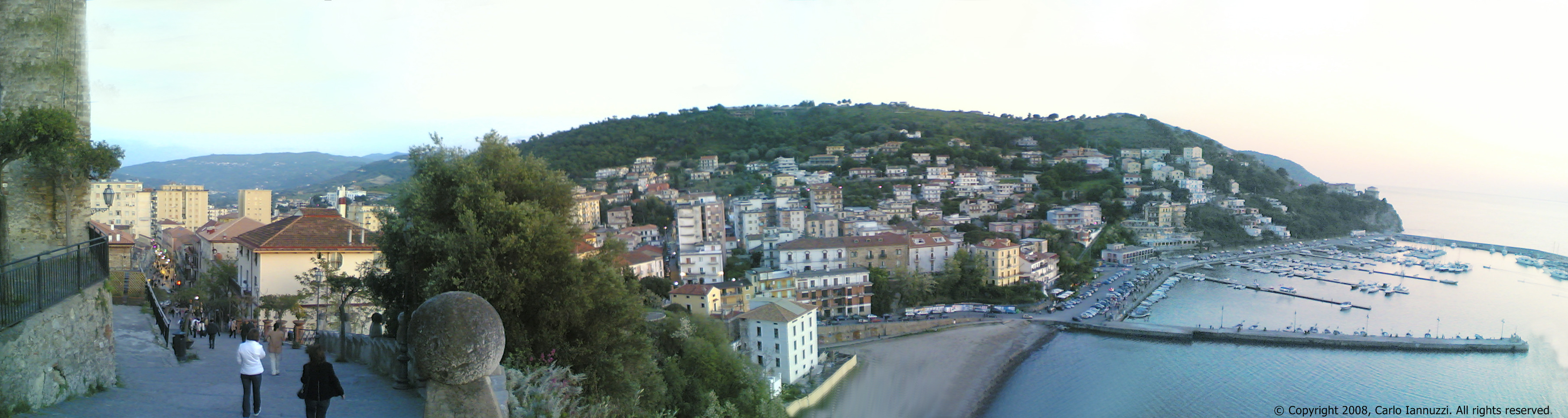 Carlo Iannuzzi, Opera Propria, Gli Scaloni e il Porto, GFDL e Creative Commons CC-BY-SA tutte le versioni (3.0, 2.5, 2.0 e 1.0), sono l'autore